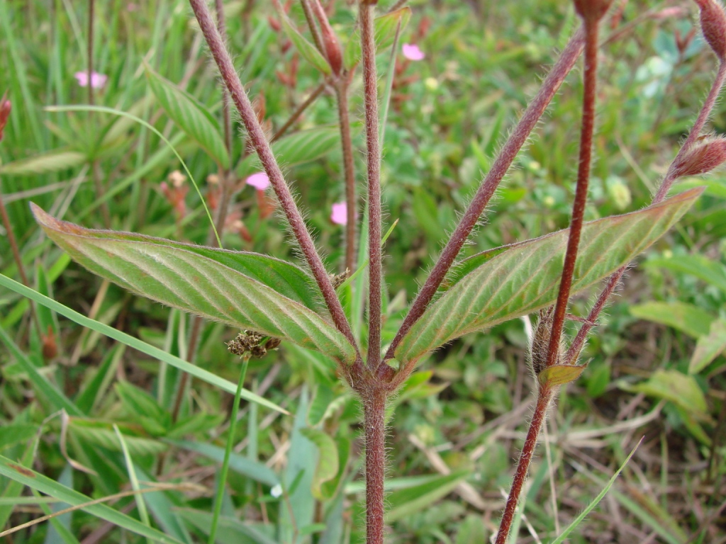 Sipanea hispida - RUBIACEAE Parque Vivencial II Lago Norte - Brasília - Distrito Federal - Brasil.